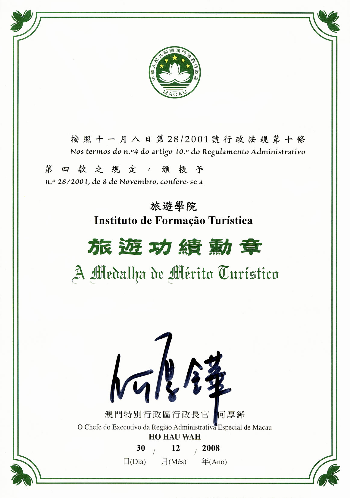 Cert da Medalha de Mérito Turistico